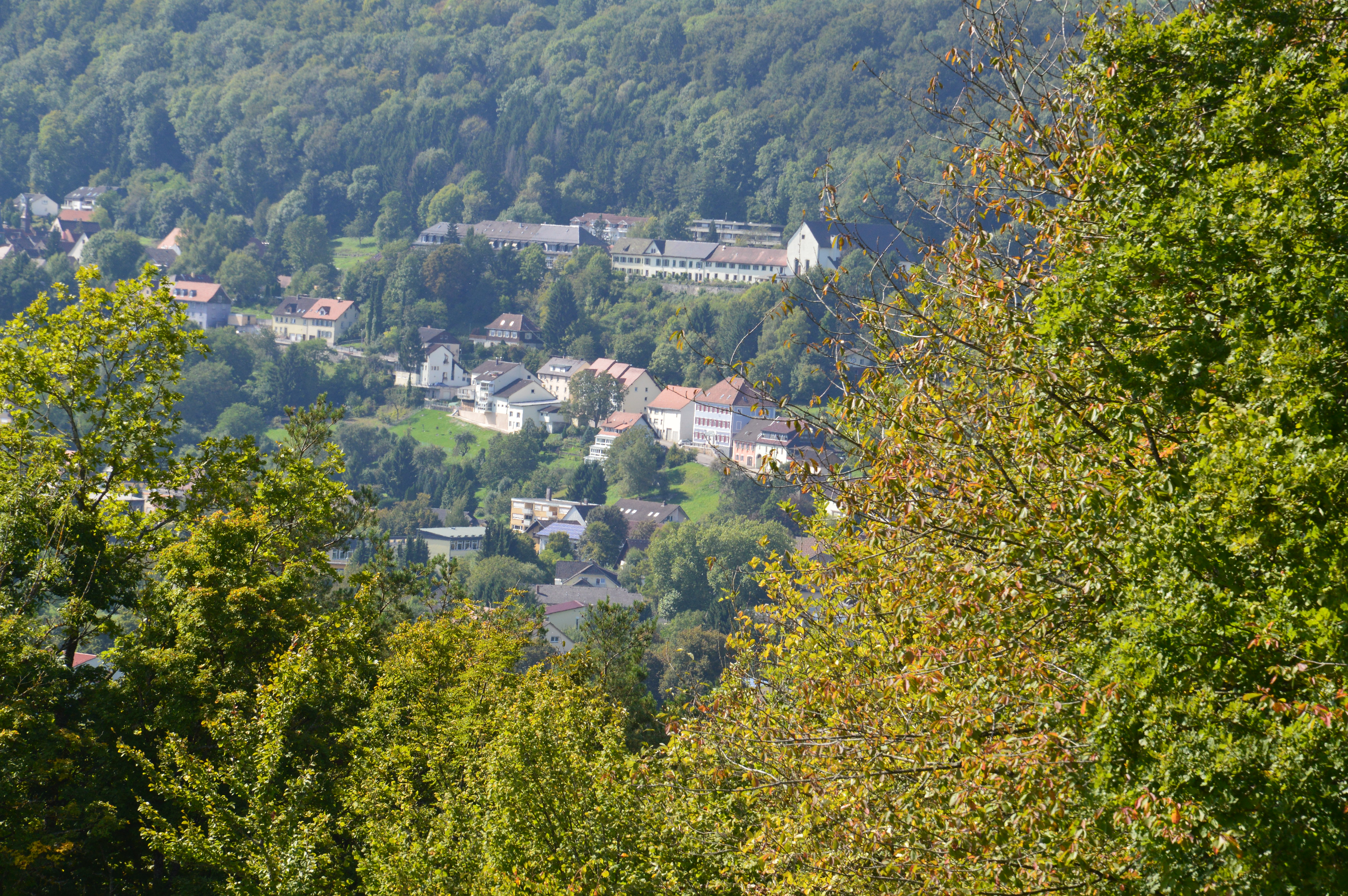 S Kapuzinerkloschter un dè oberè Stadtwäg. Ganz rächts s blauè Huus isch diè aalt Schuèl resp. s Voreinshuus.